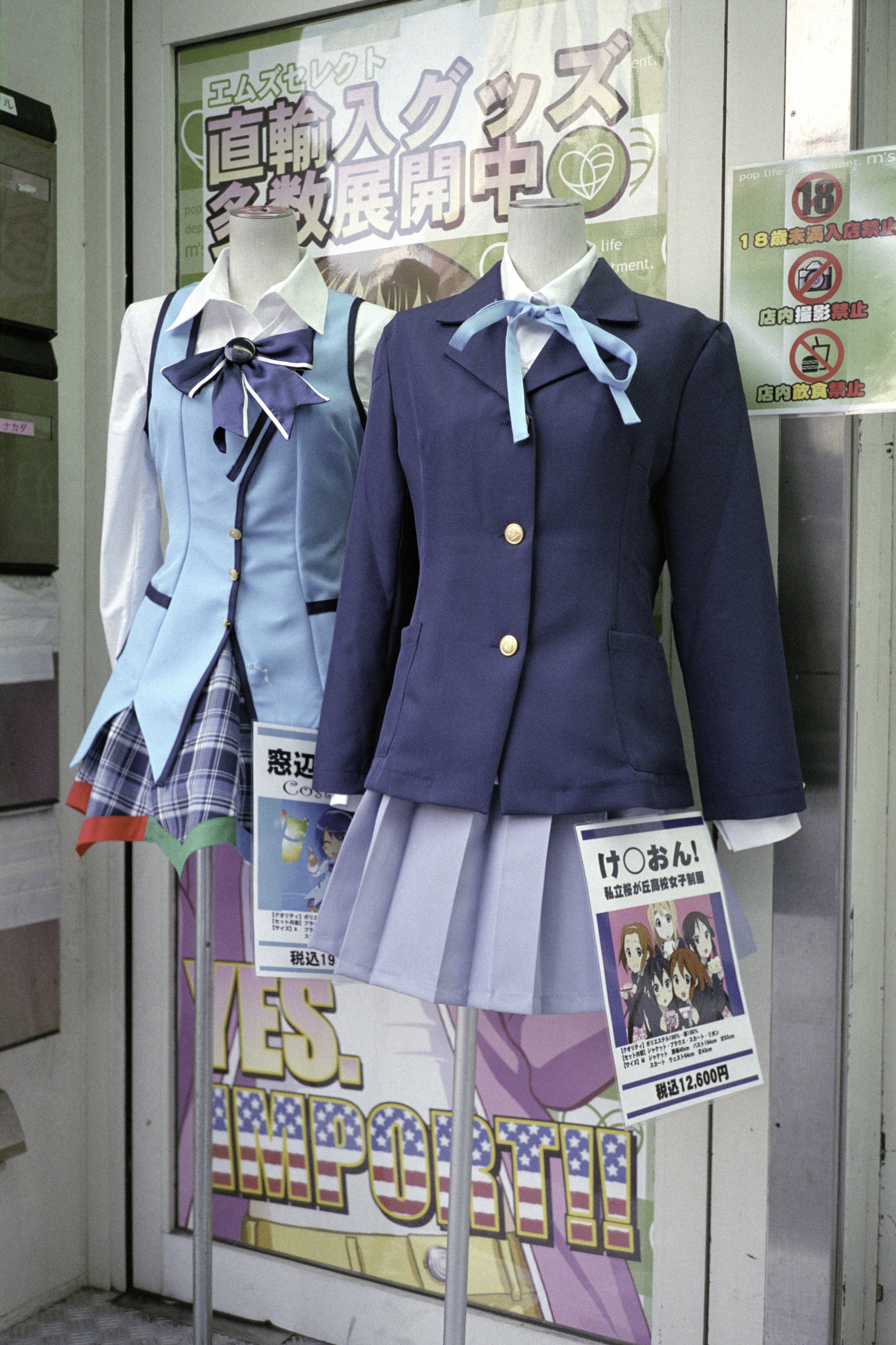 中文（台灣）: 窗邊奈奈美制服與《K-ON！輕音部》櫻丘高中制服。